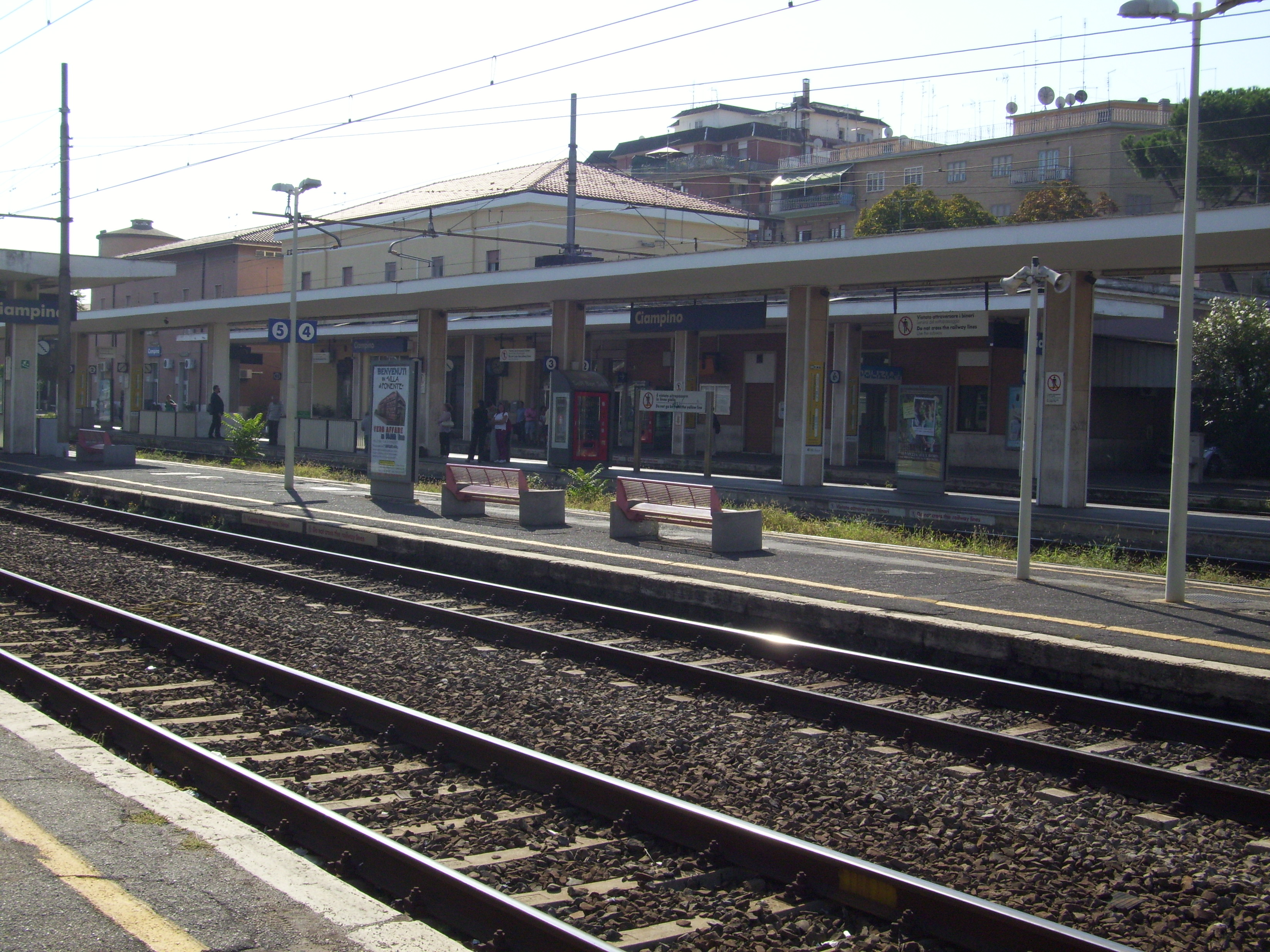 Foto della stazione ferroviaria di Ciampino dalla 4ª banchina al servizio dei binari 6 e 7.